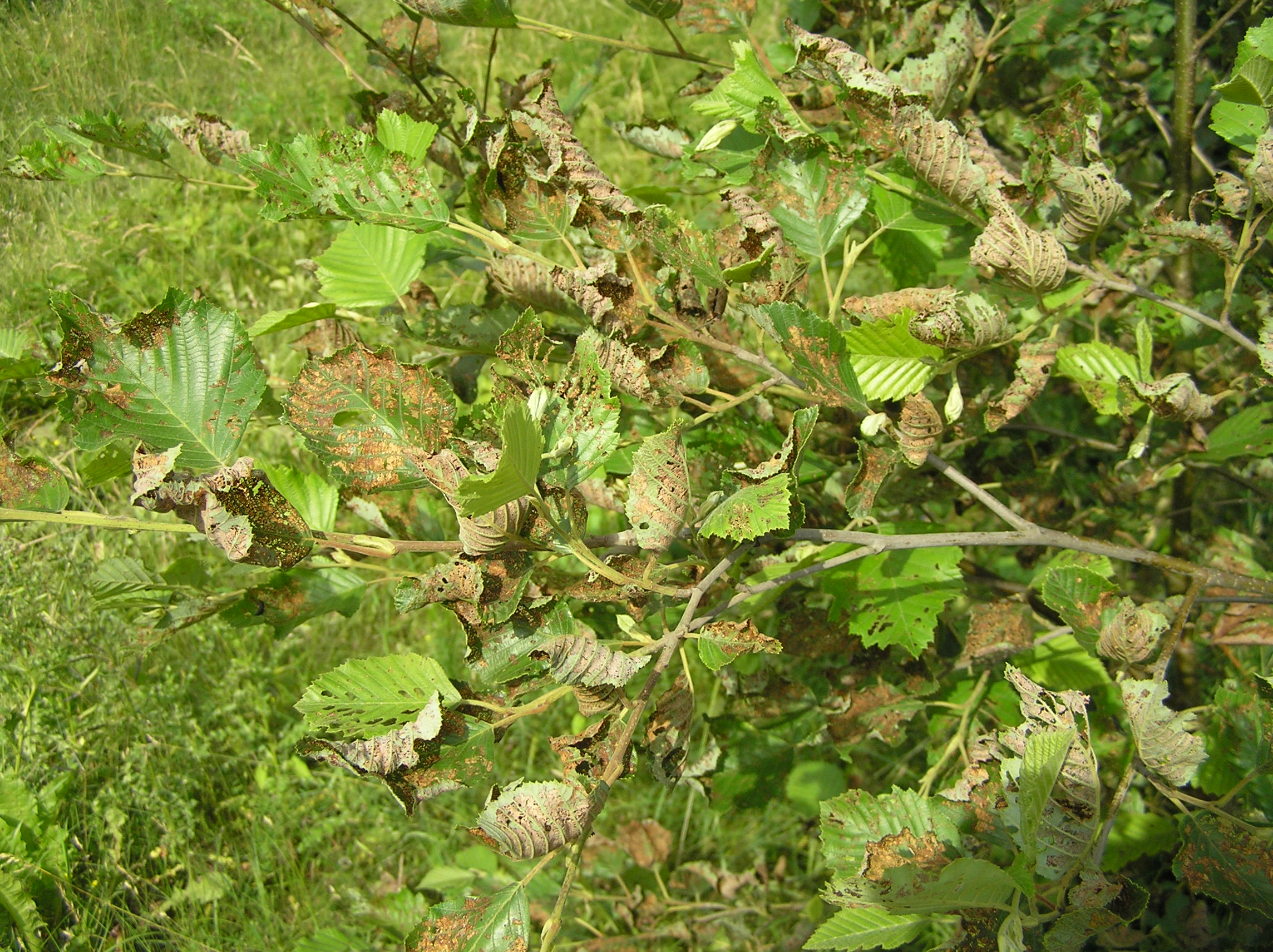 Agelastica alni on Alnus incana